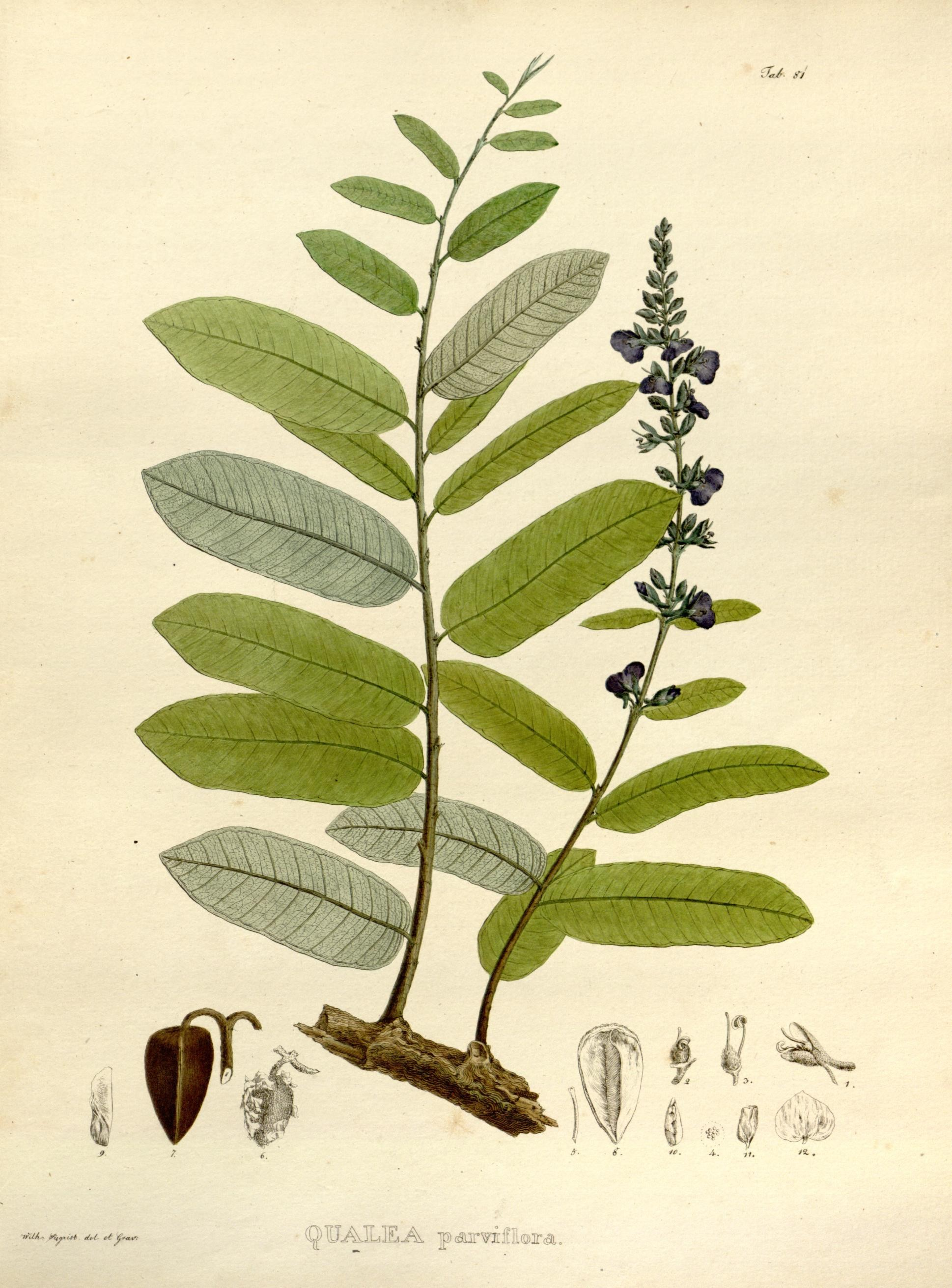 Qualea parviflora Nova genera et species plantarum. Monachii [Munich] :Impensis Auctoris,1824-1829 [i.e. 1824-32]..